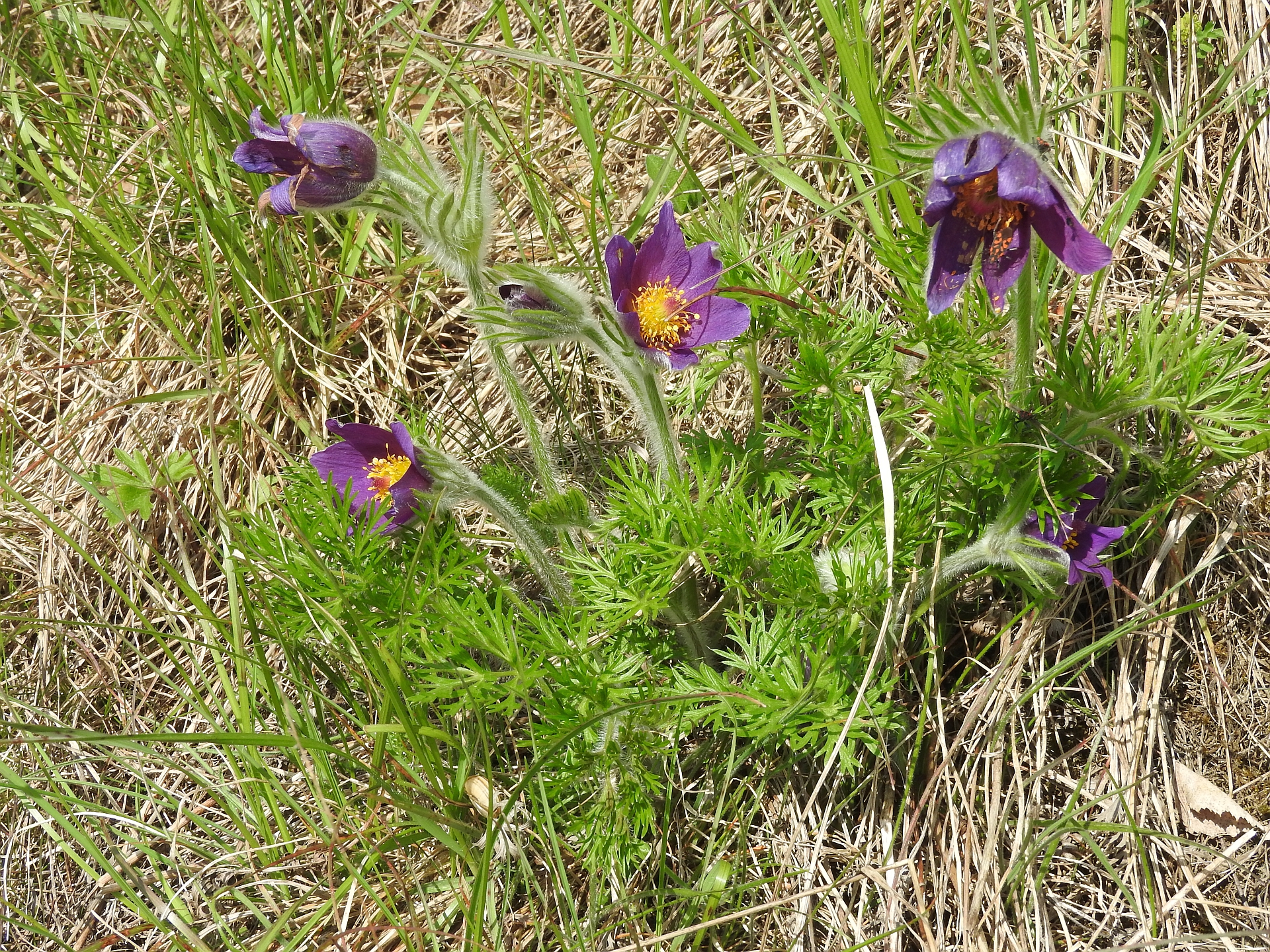 Naturschutzgebiet Beim Roten Kreuz, 12.04.2016